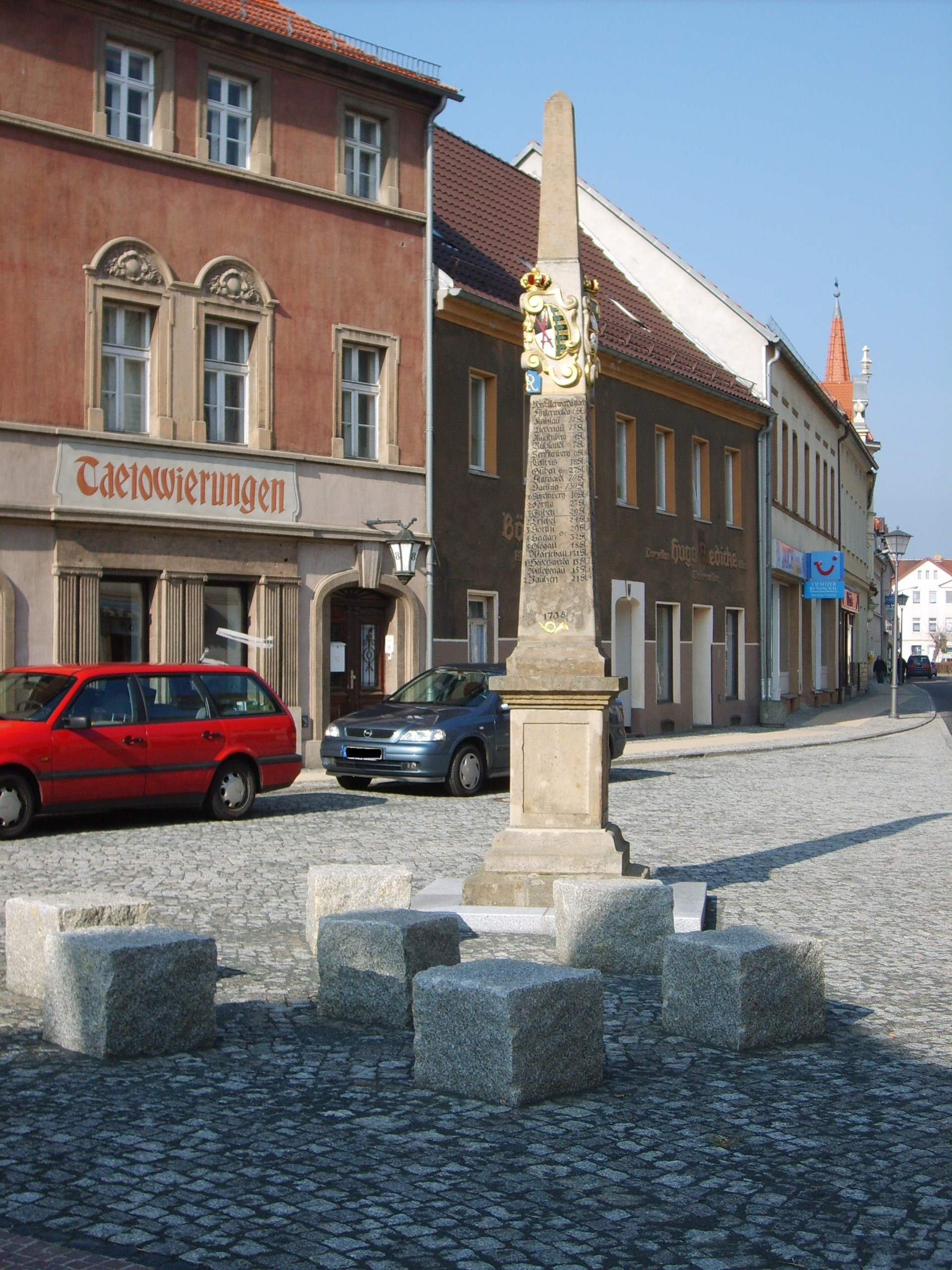 Postsäule_Elsterwerda